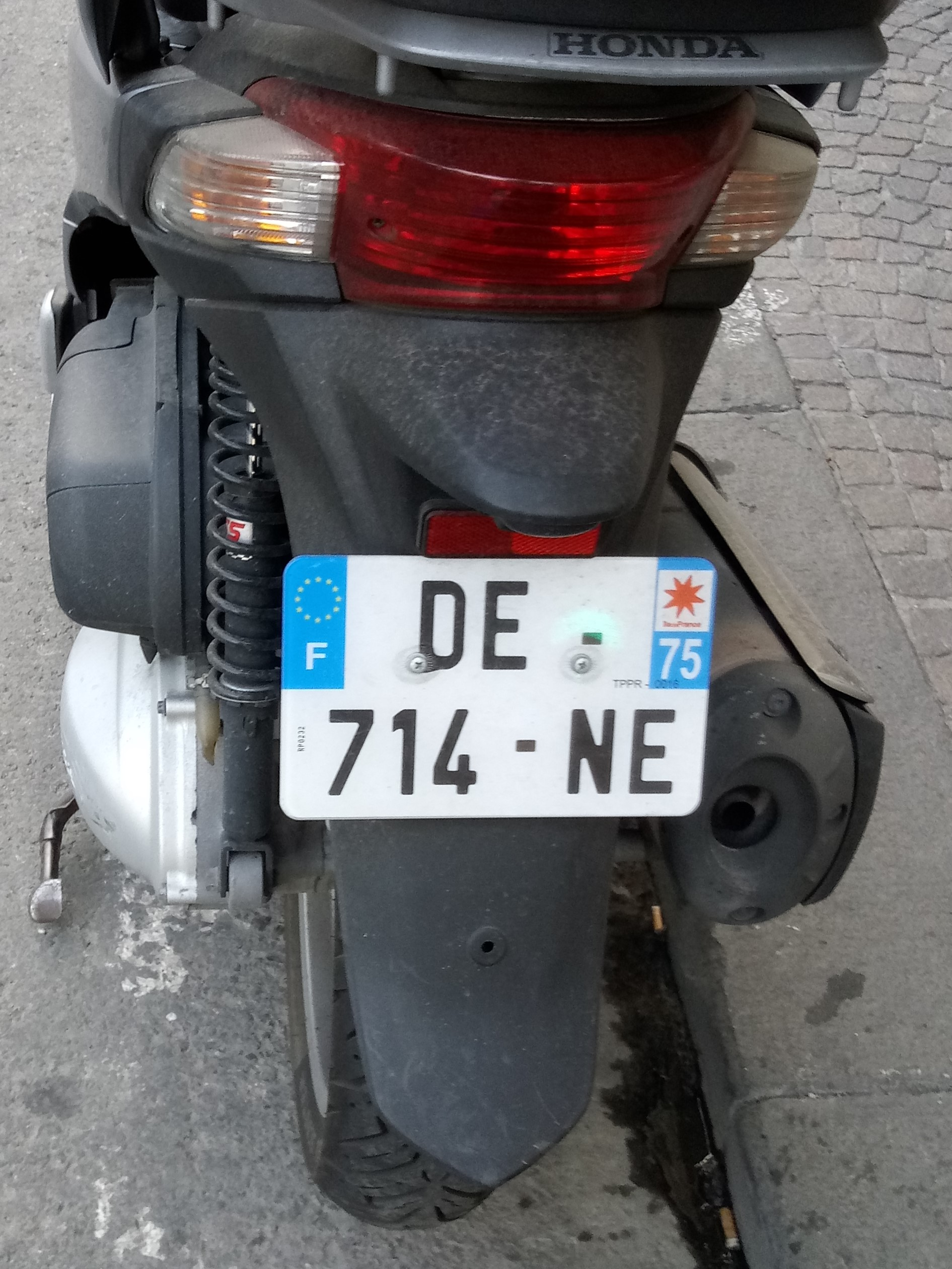 La foto rappresenta la targa di uno scooter immatricolato in Francia con formato in uso da luglio 2015